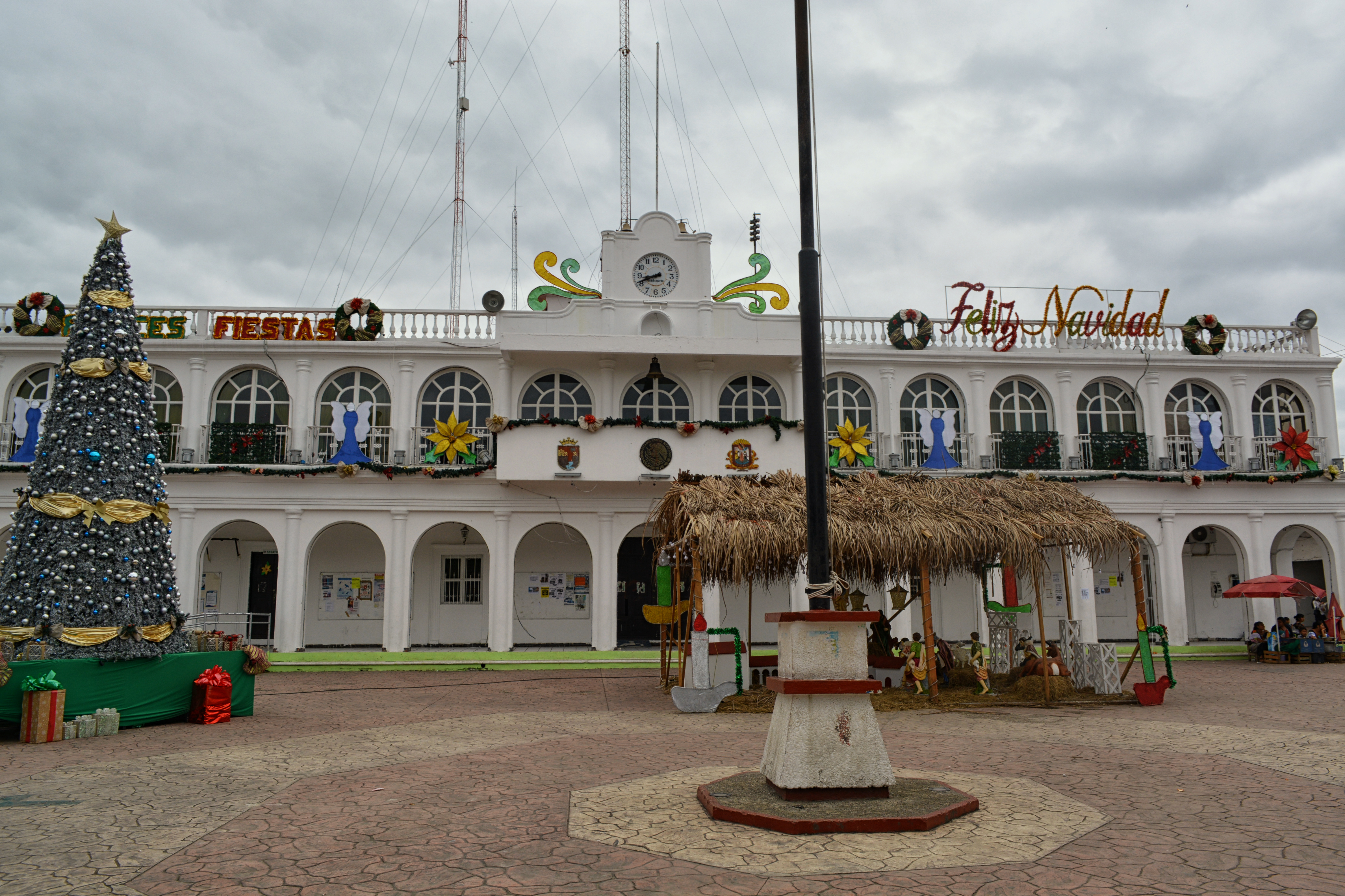 Palacio municipal. Ocosingo, Chiapas.